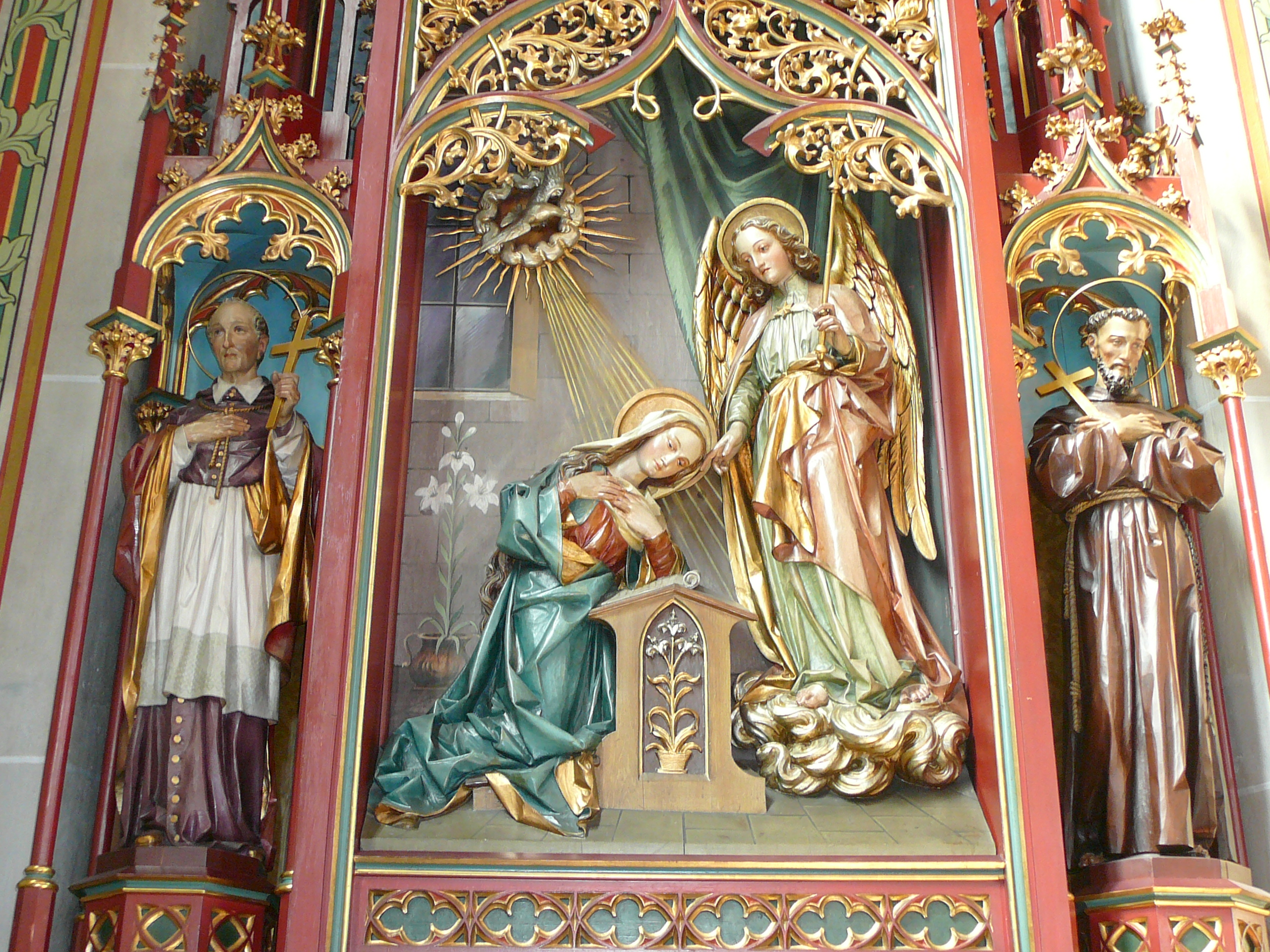 Dreifaltigkeitskirche Bülach Blick, Seitenaltar